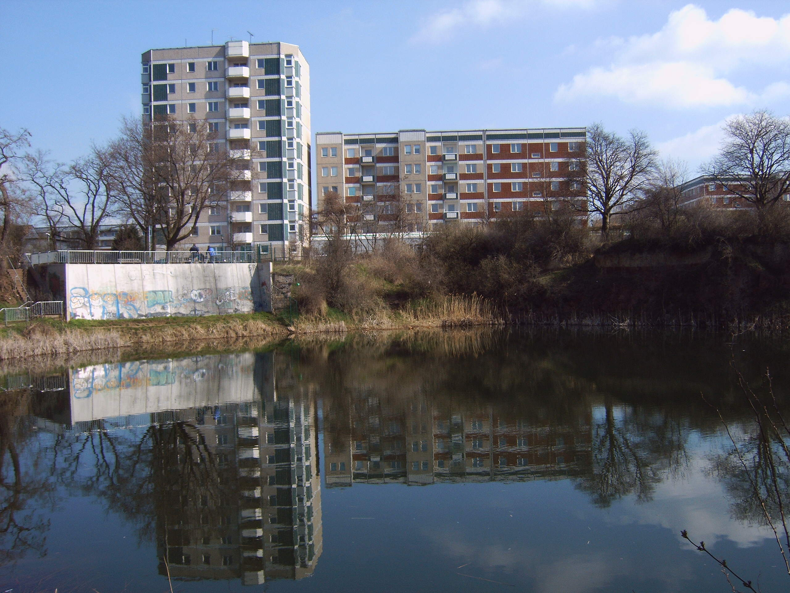 Sternsee in Magdeburg-Neu Olvenstedt, Deutschland Bild aufgenommen am 15.4.2006